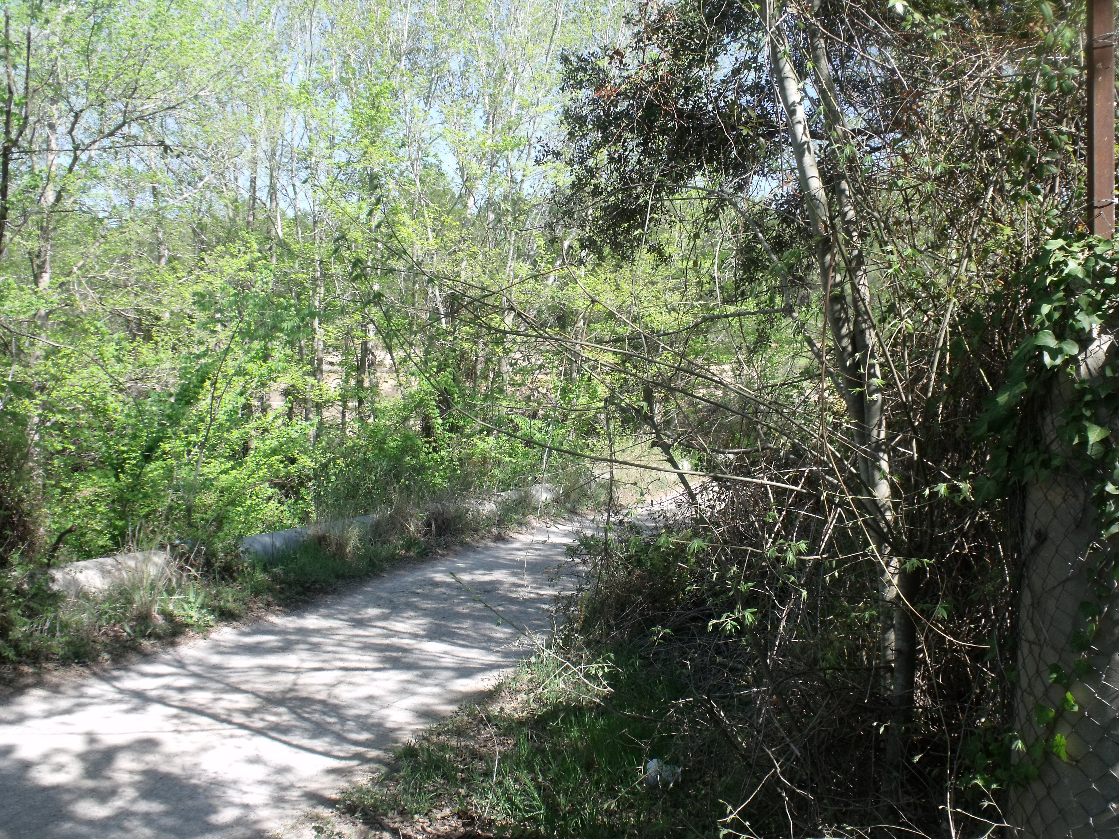 Pont sobre el barranc de Cortitxelles